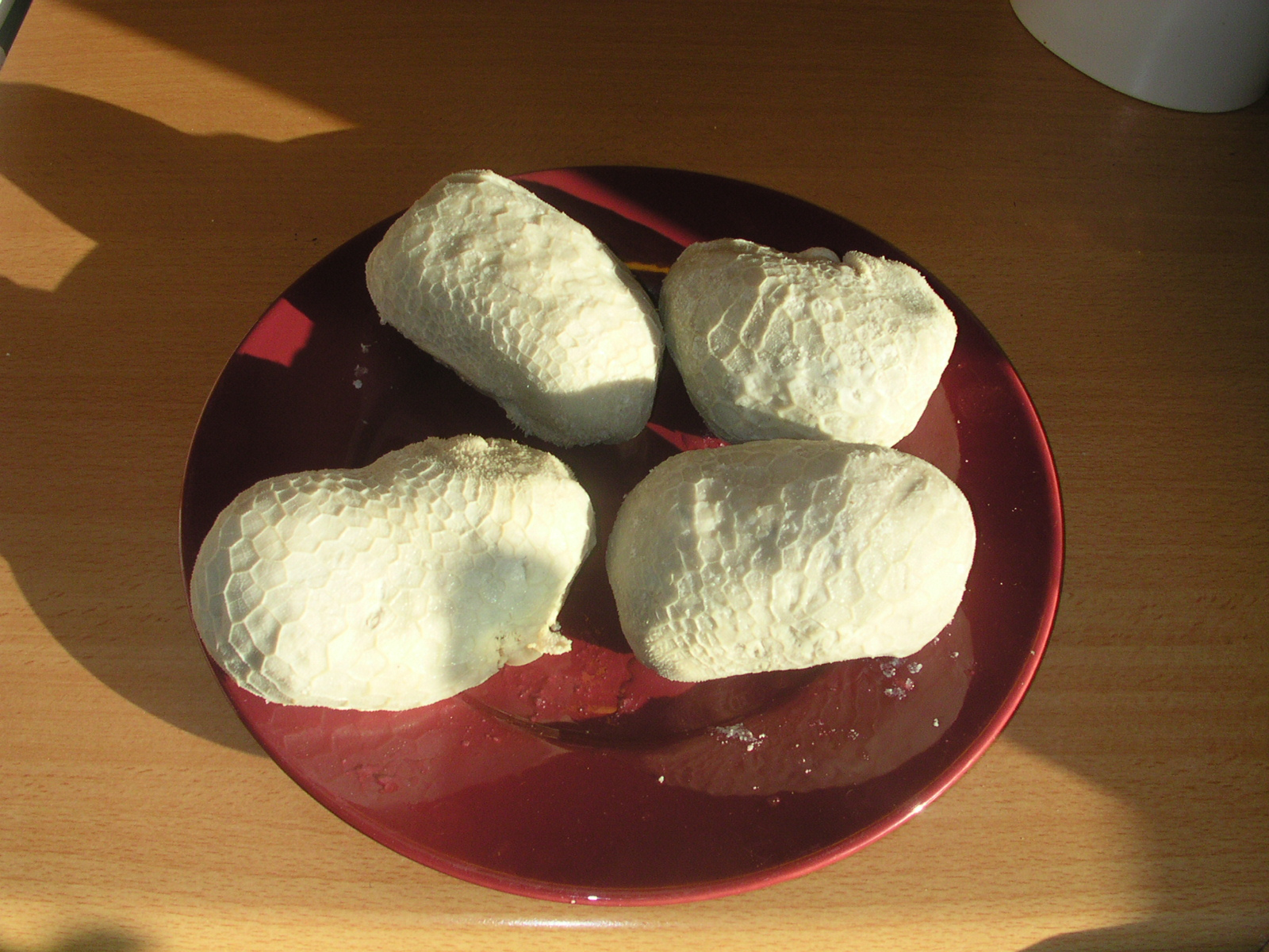 Les pansettes de Gerzat La pansette de Gerzat est la spécialité de la ville de Gerzat dans le Puy-de-Dôme.